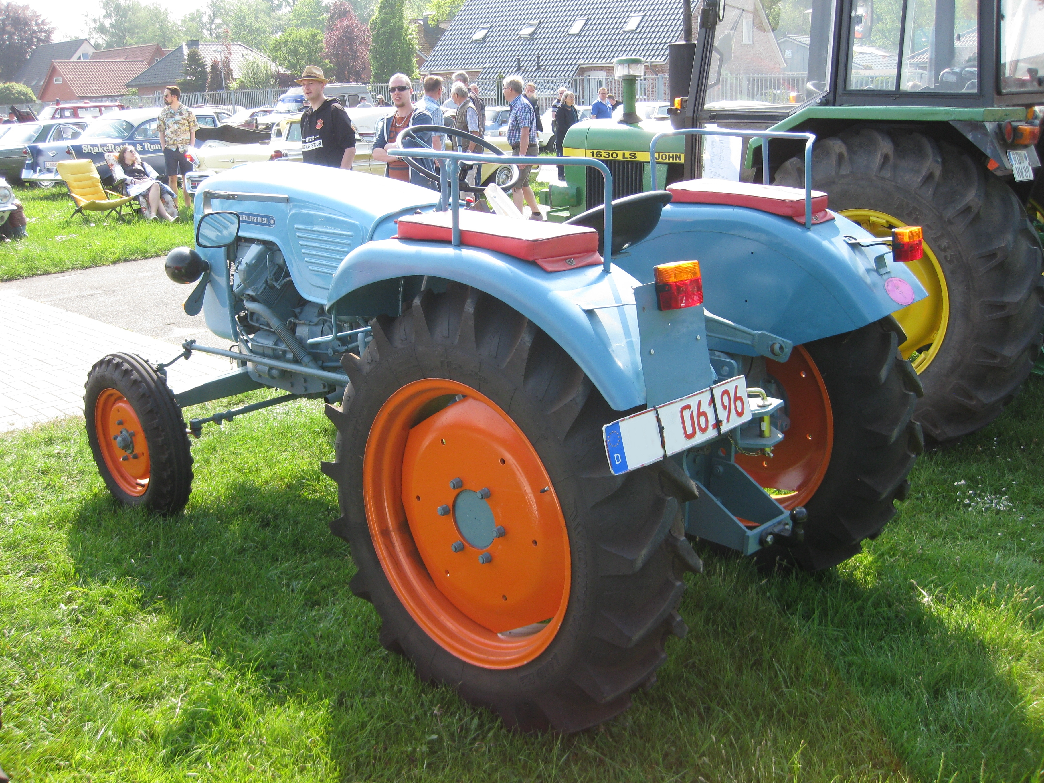 Traktor Warchalowski